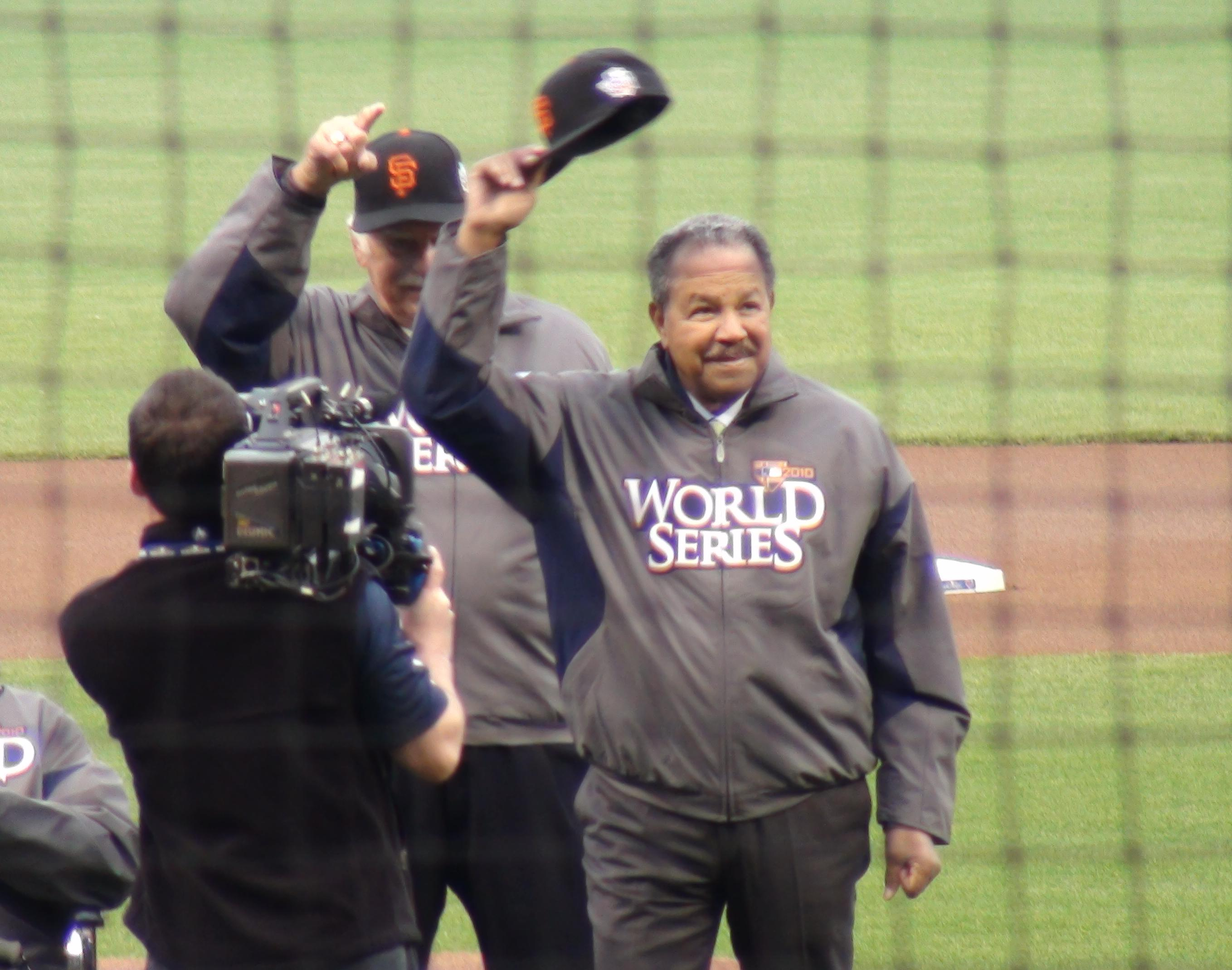 Juan Marichal